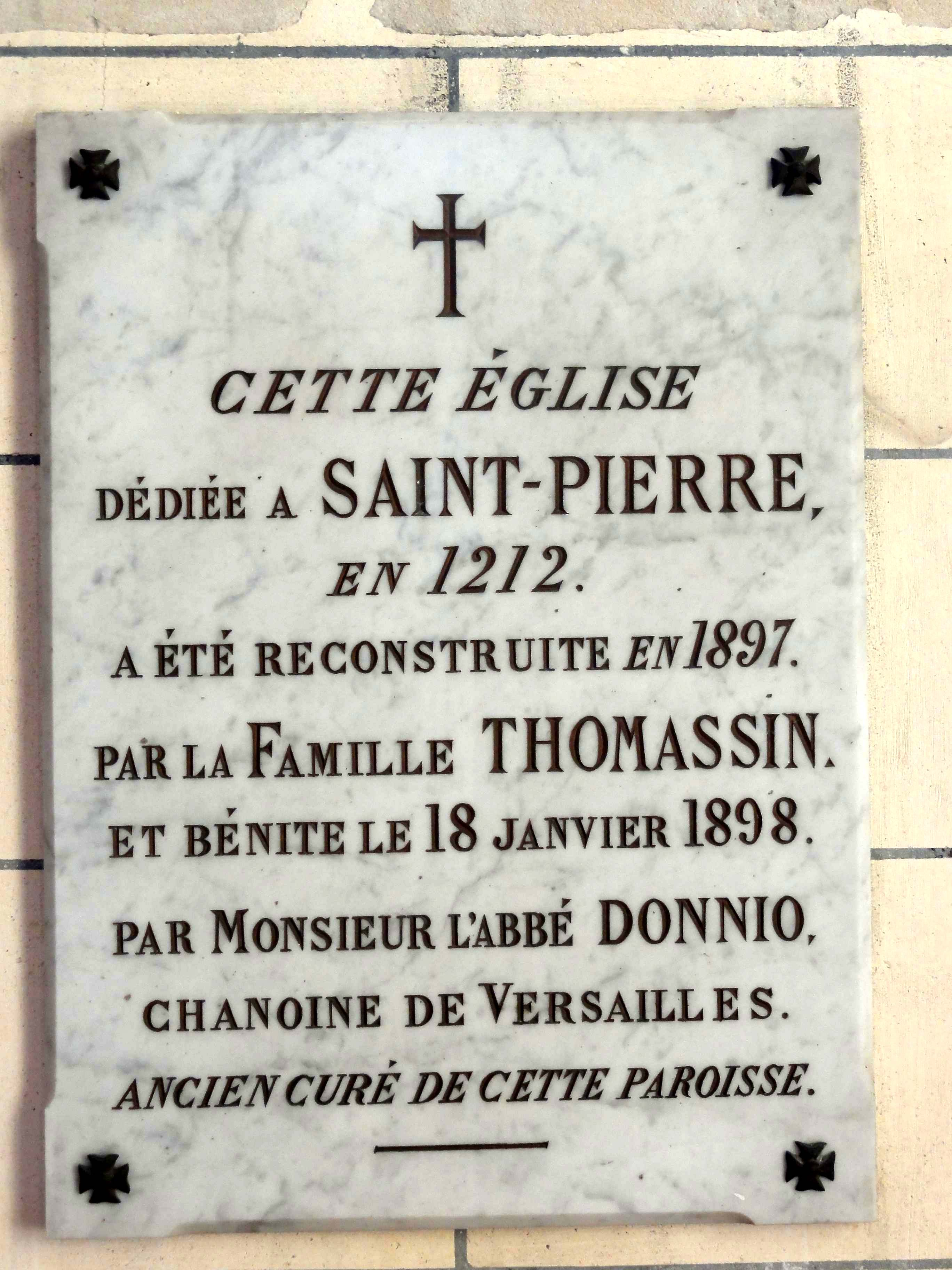 Mobilier de l'église - voir titre.